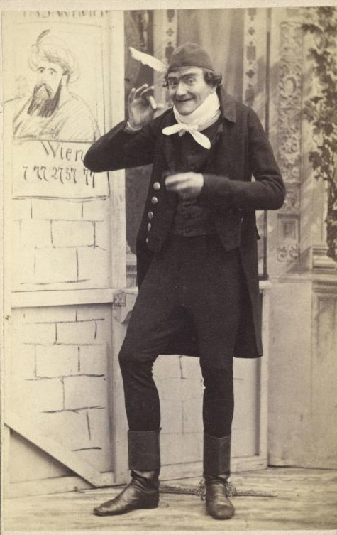 Johann Nestroy als Tratschmiedl in seinem Stück "Der Tritschtratsch"; ÖNB Bildarchiv und Grafiksammlung (POR), Signatur: Kor 110/8